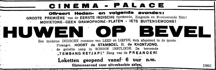 Newspaper advertisement for Huwen op Bevel